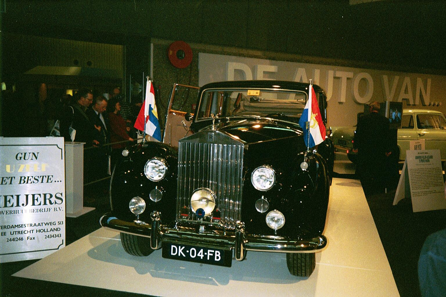 Rolls-Royce Silver Wraith Limousine State Landaulette, de Rolls Royce waarin ZKH Willem-Alexander van Oranje en HKH Máxima Zorreguieta gereden werden naar hun trouwerij